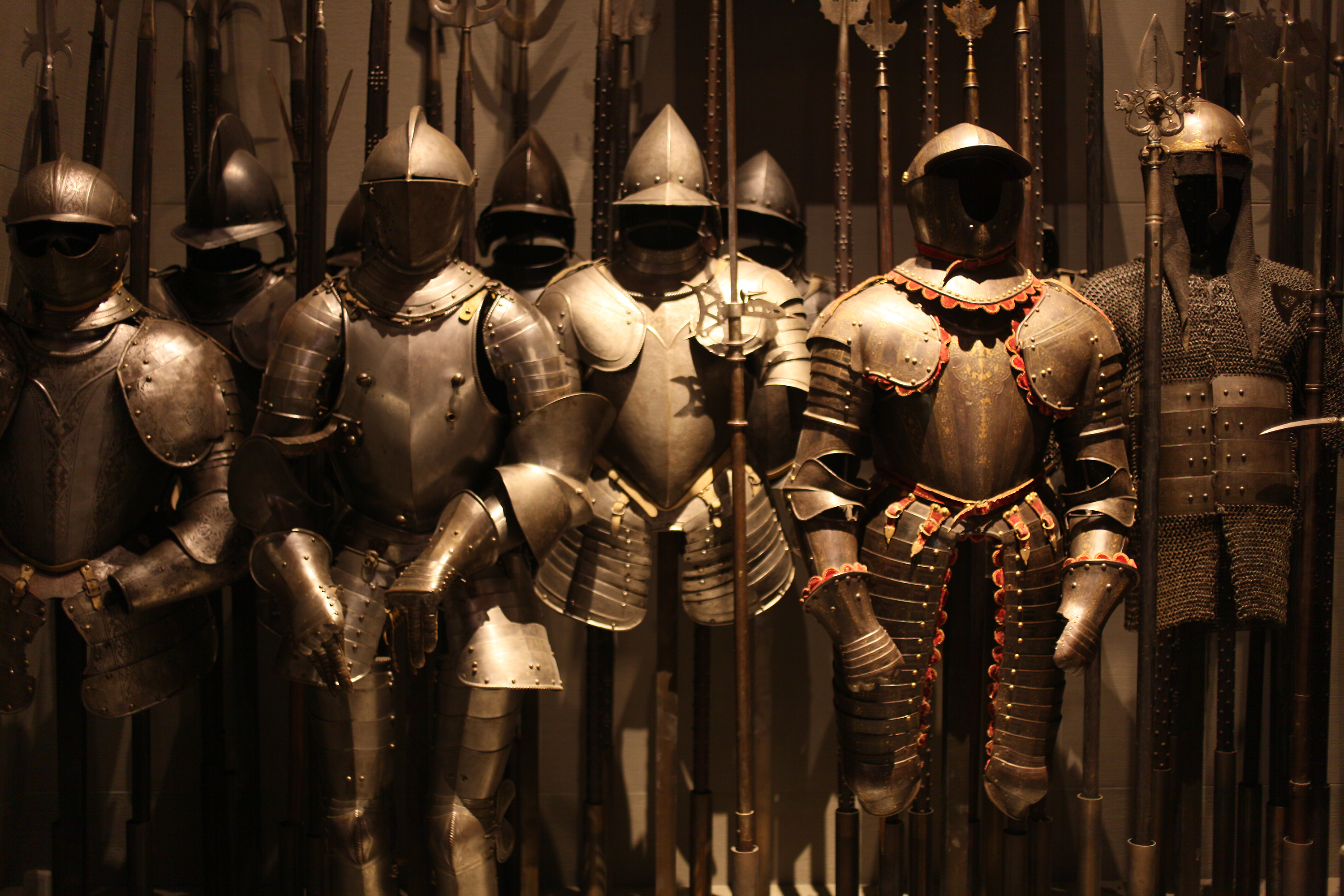 Armature nella Sala d'armi del Museo Poldi Pezzoli, Milano, nell'allestimento di Arnaldo Pomodoro